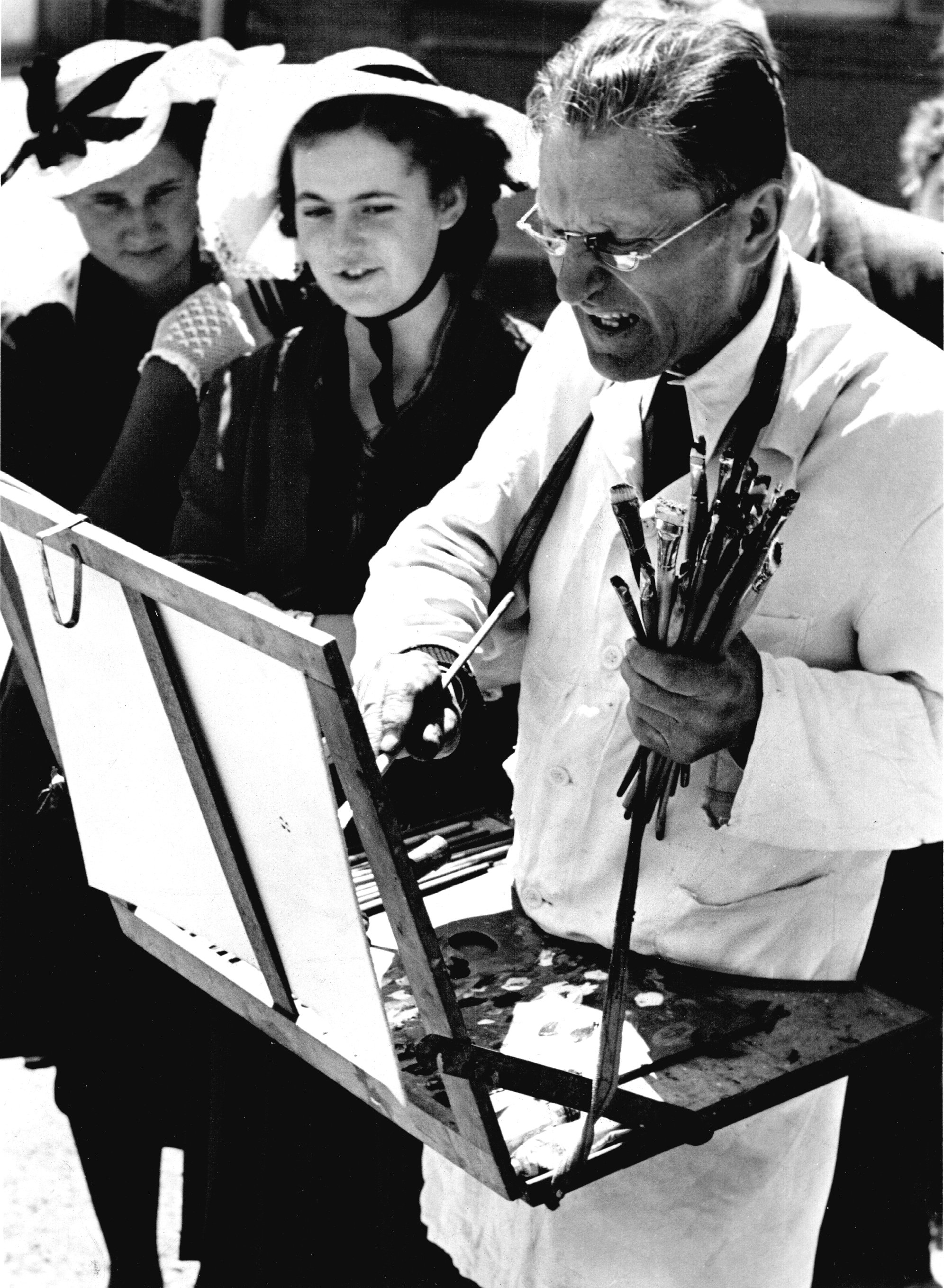 Photographie